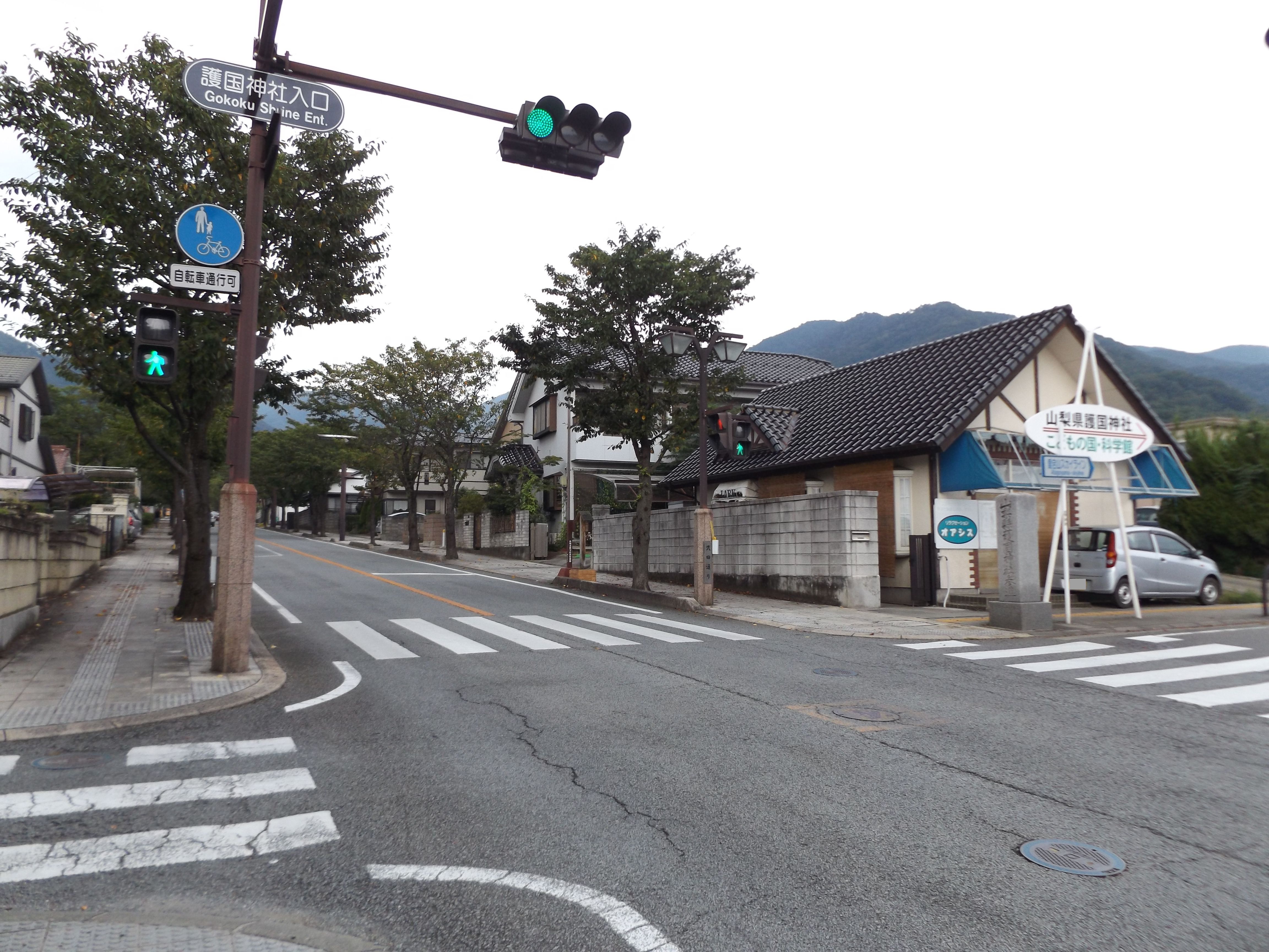 山梨県甲府市にある山梨県道31号甲府山梨線の護国神社入口交差点。 山梨県道119号愛宕山公園線の起点である。